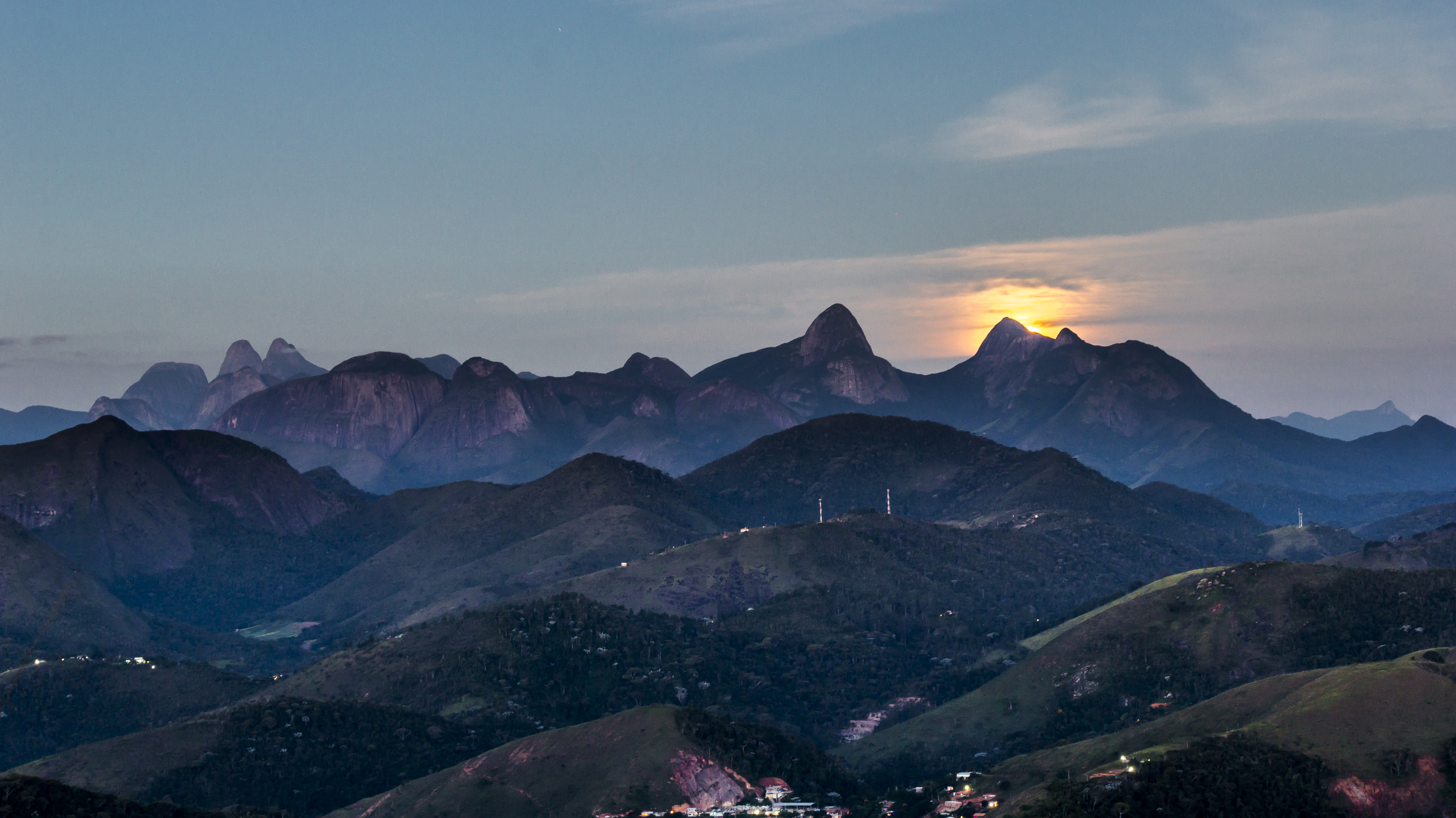 Nascer da Lua atrás da Mulher de Pedra e Três Picos